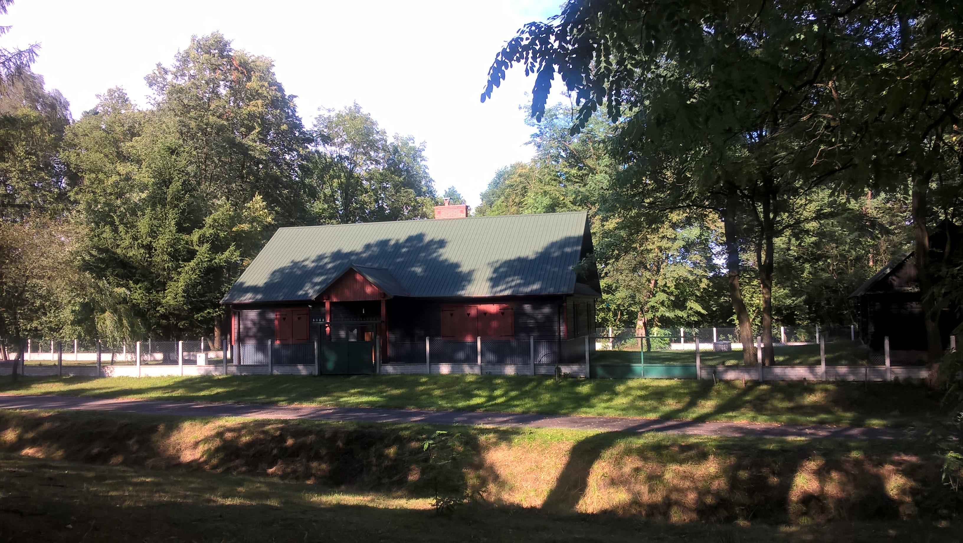 Luchów Górny, zabytkowa plebania